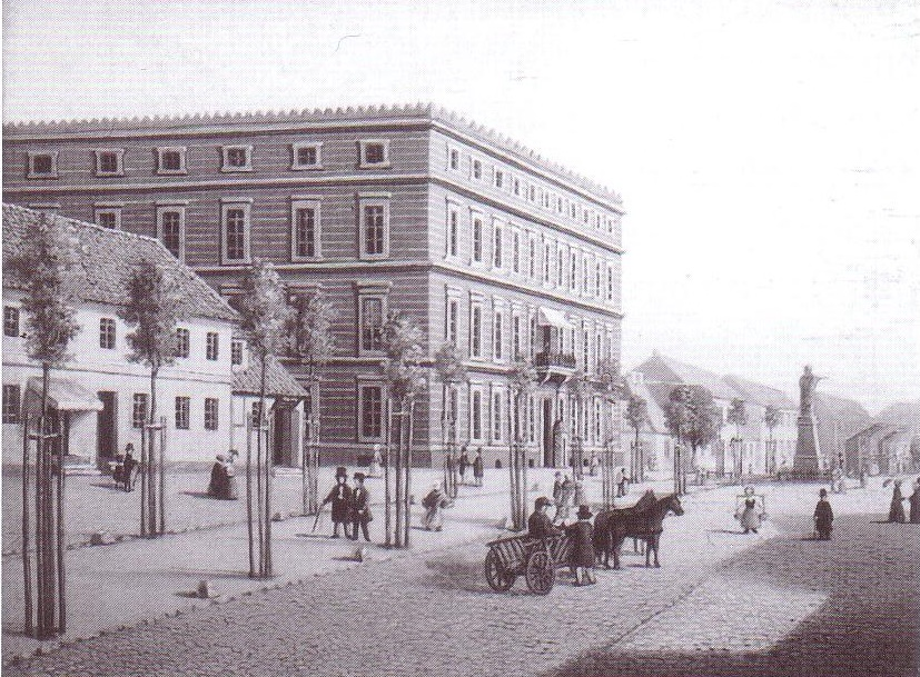 C. F. Keßler: "Das Regierungsgebäude in Gumbinnen mit dem Denkmal Friedrich Wilhelms I." Aus dem Schlafzimmer der Kaiserin (Raum 486 im Königsberger Schloss). 1944 nach Rheinsberg ausgelagert, Verbleib unbekannt (SPSG, GK 1 1744)